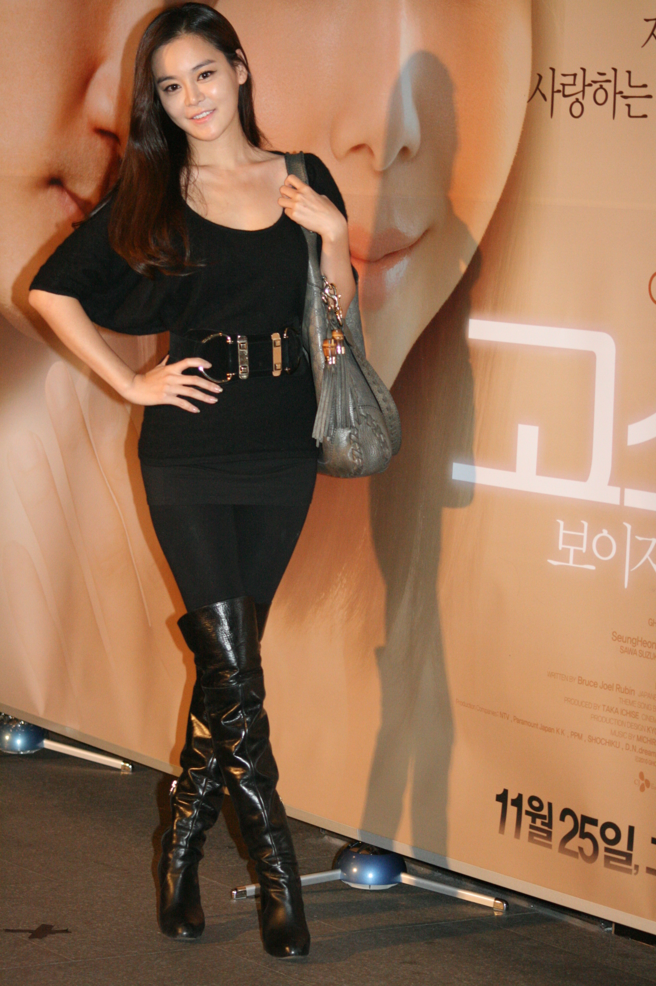 영화 고스트: 보이지 않는 사랑 시사회